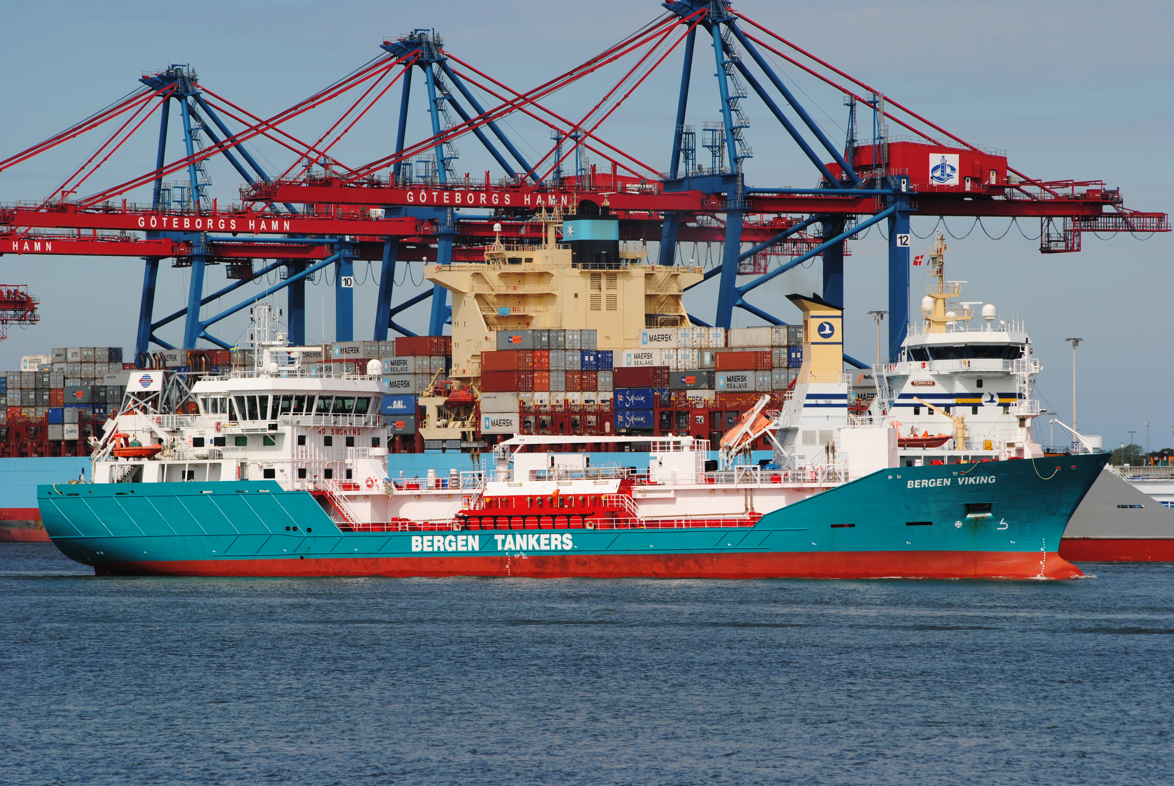 Bergen Viking vid skandiahamnen